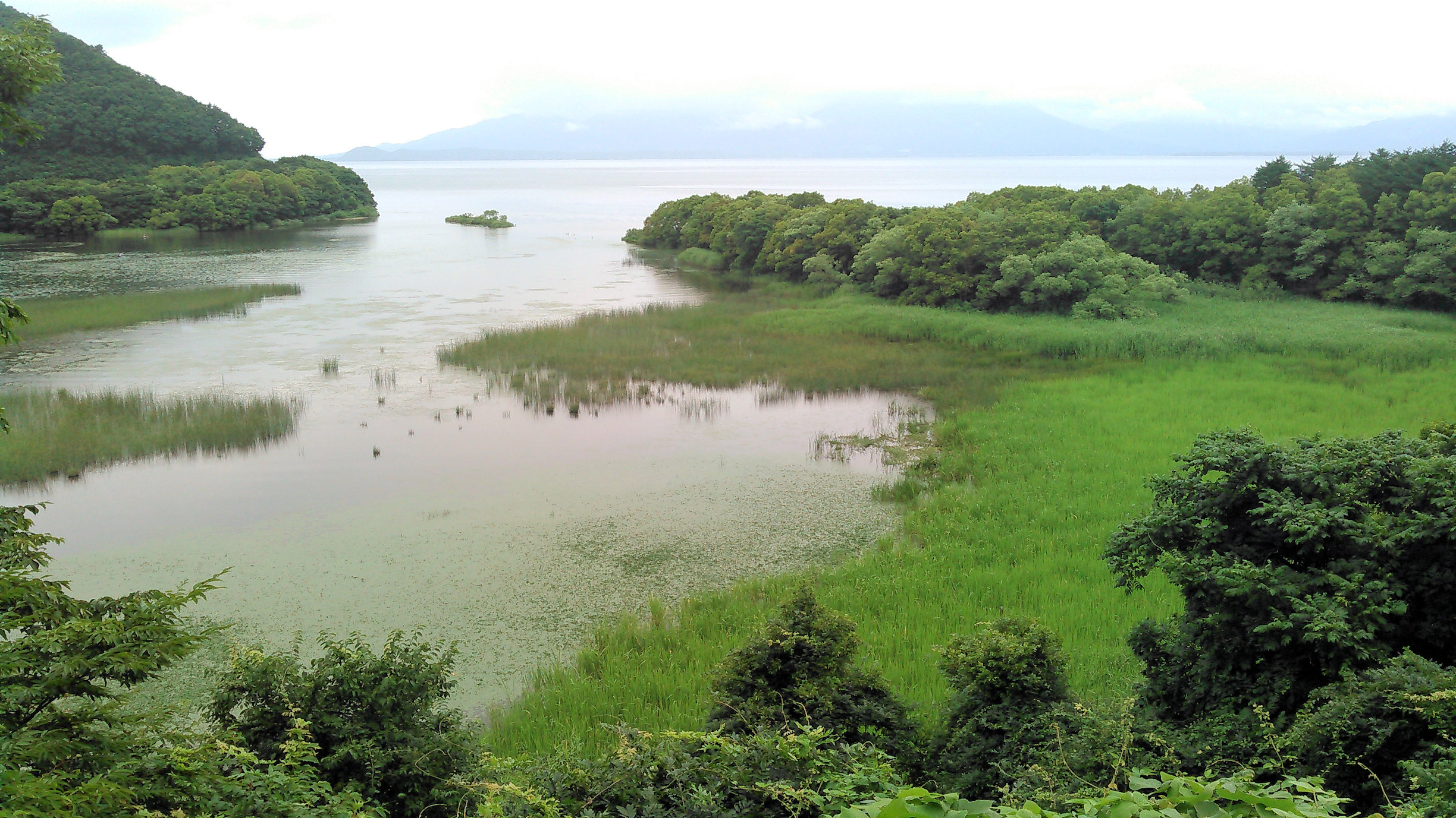 郡山市湖南町の猪苗代湖 鬼沼